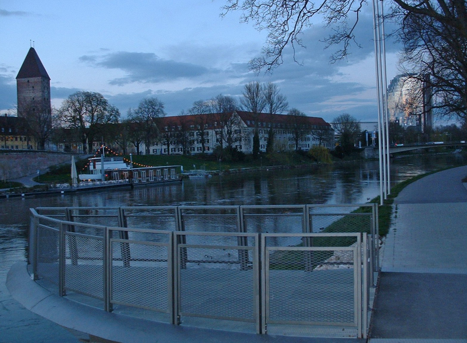 Partie an der Donau, Standort: Maxplatz, mit Blick aufs Ulmer Ufer: links der historische Gänsturm, am rechten Bildrand im Hintergrund, von der Abendsonne beschienen, das die Ulmer Silhouette mitprägende "Maritim"-Hotel; am Ufer vertäut das Gastro-Schiff